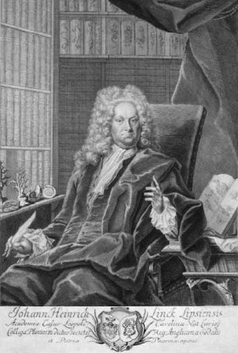 Der Leipziger Apotheker und Naturforscher Johann Heinrich Linck, der Ältere